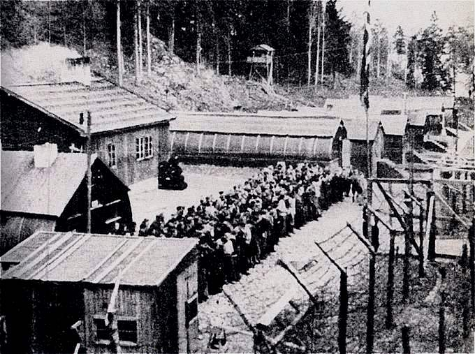 Fangeleiren på Fiskevollen ved Oslo